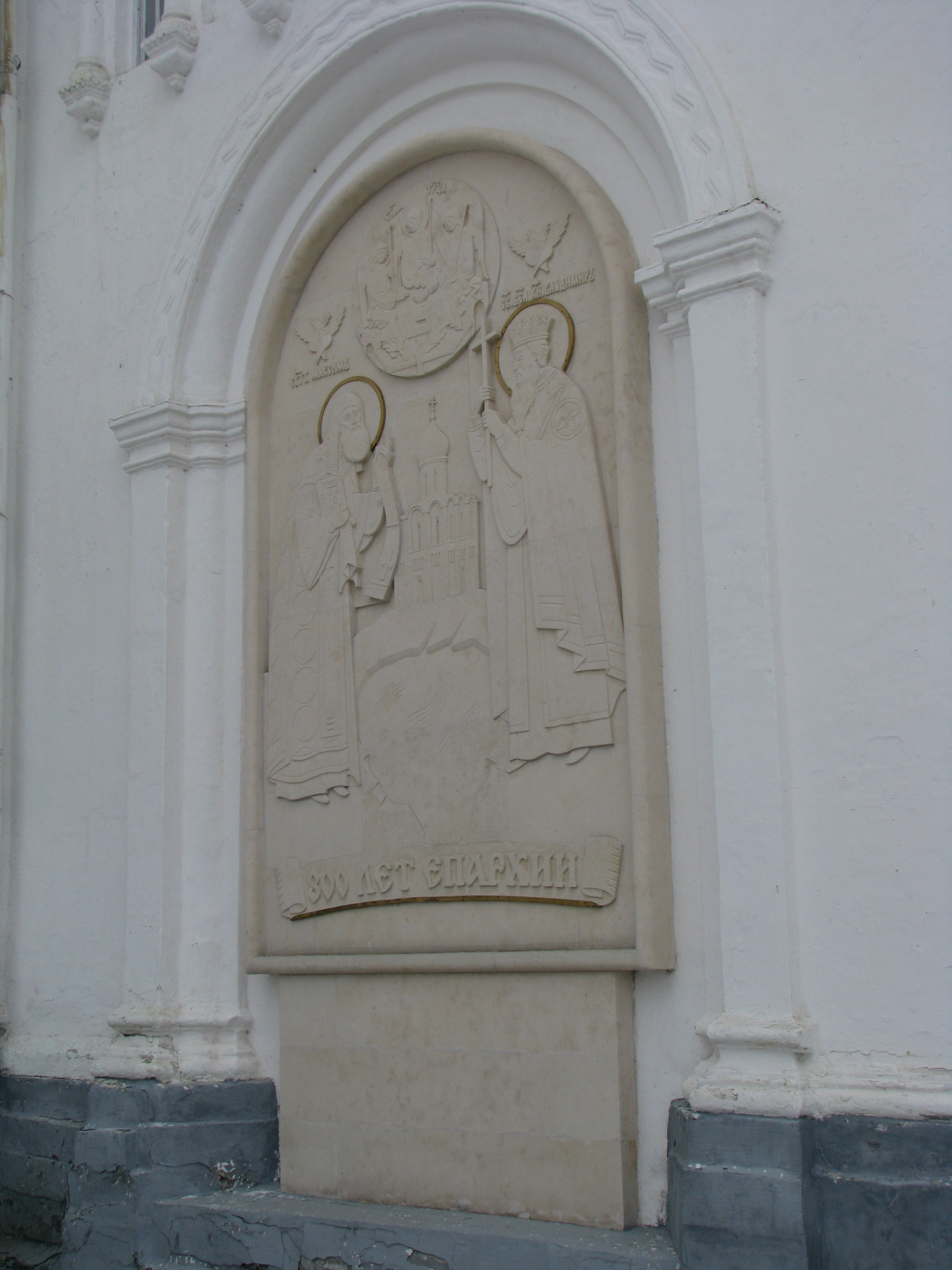 Собор Успения Пресвятой Богородицы во Владимире